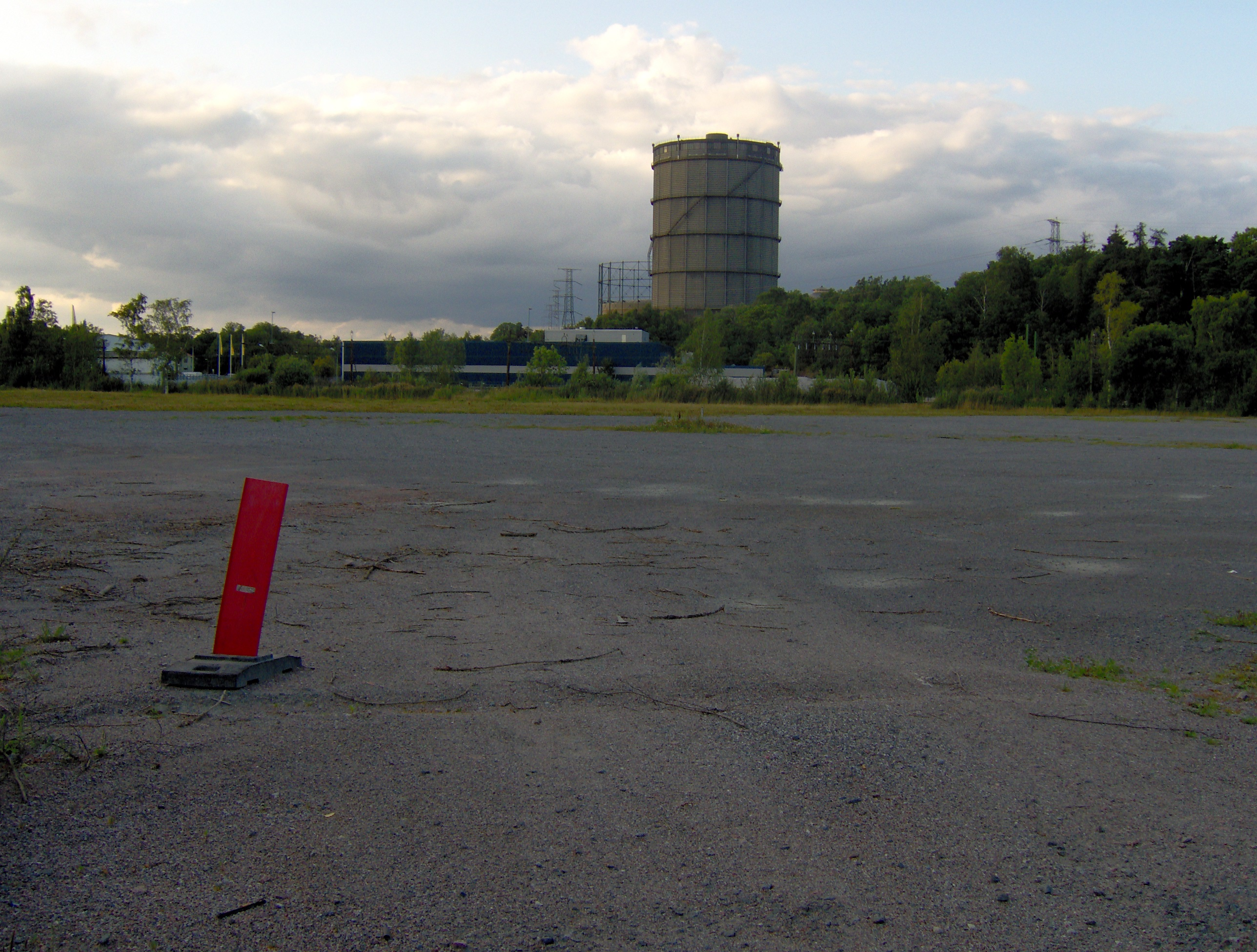 The open area at Storängsbotten, Stockholm, Sweden.